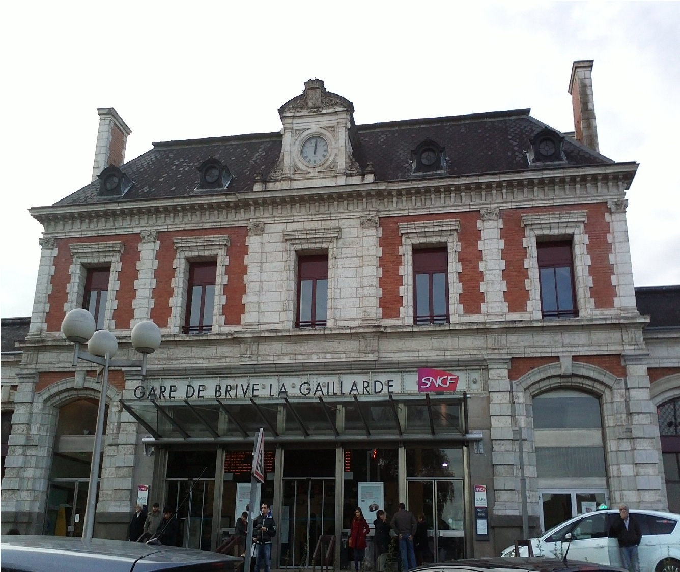 Gare de Brive-la-Gaillarde (Corrèze, France).